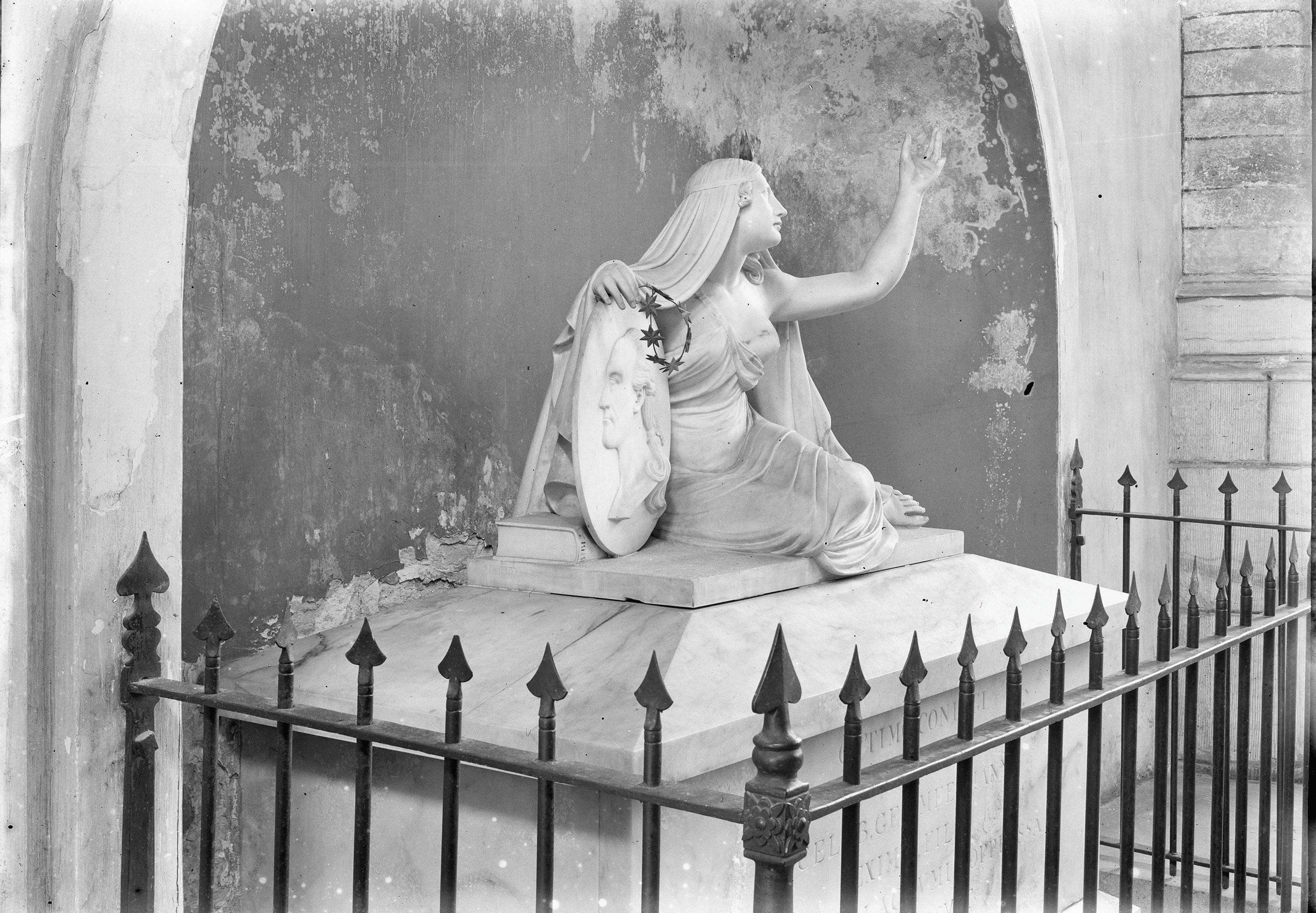 Sint Pieterskerk: graftombe Meerman